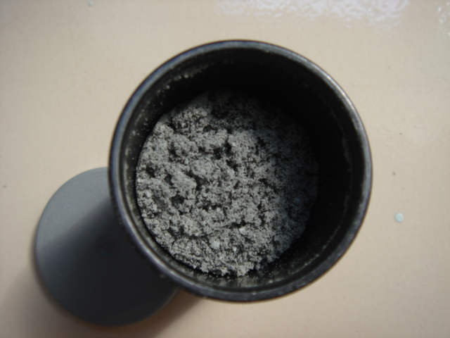 Thuốc nổ đen đã pha trộn (KNO3, S, C).